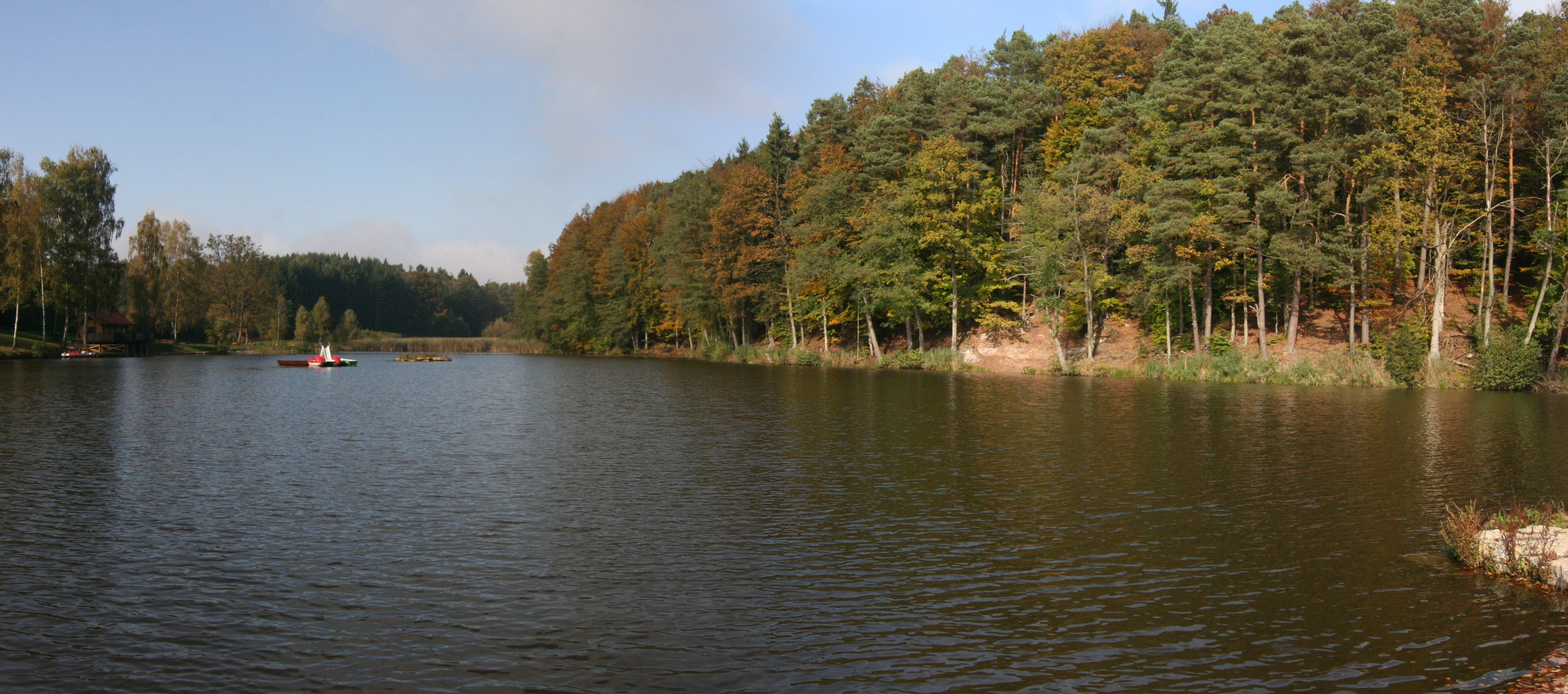 Panoramabild des Finsterroter Sees in Wüstenrot-Finsterrot